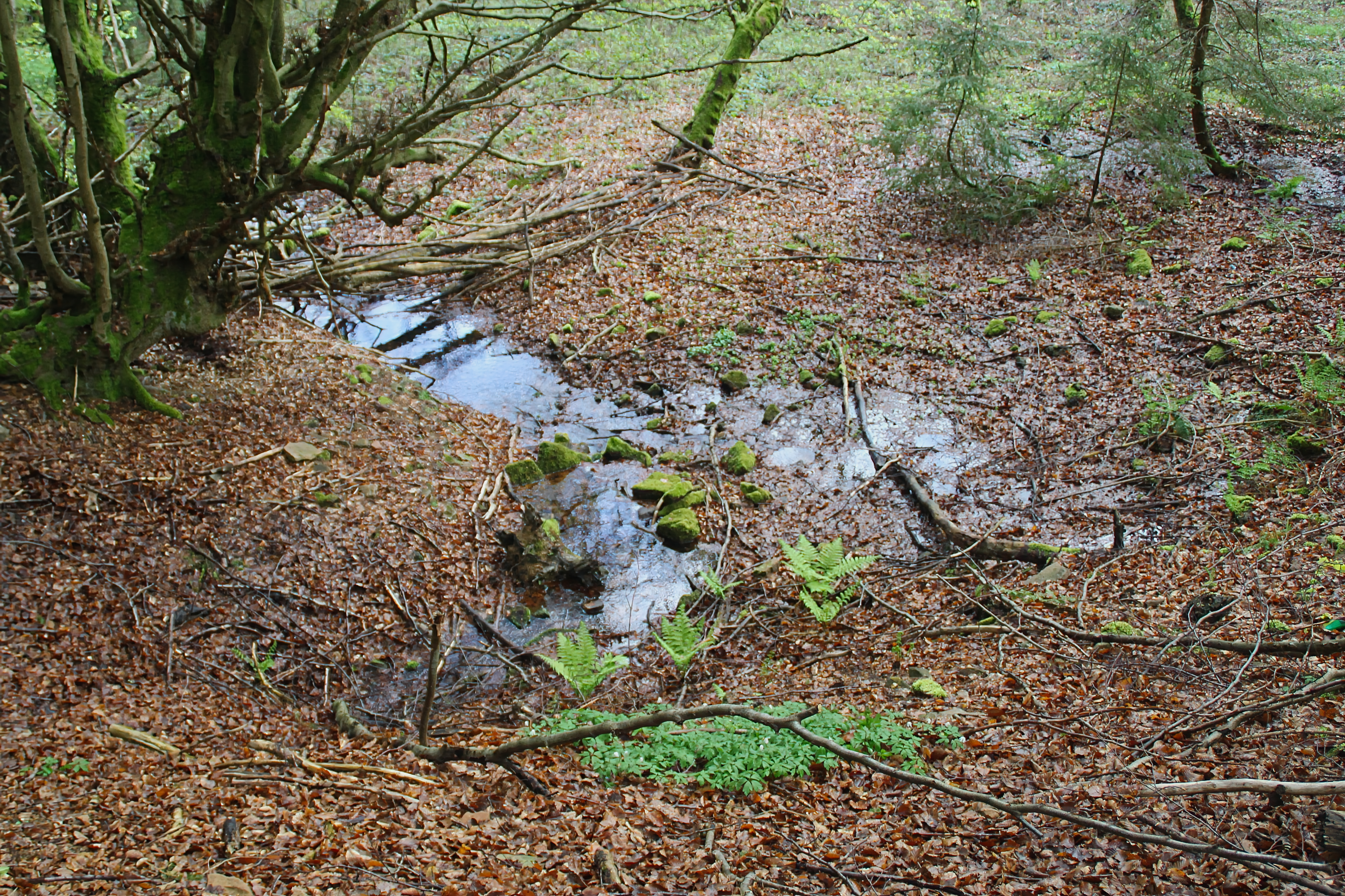 Hauptquelle des Edelbaches bei Edelbach im Landkreis Aschaffenburg, Bayern